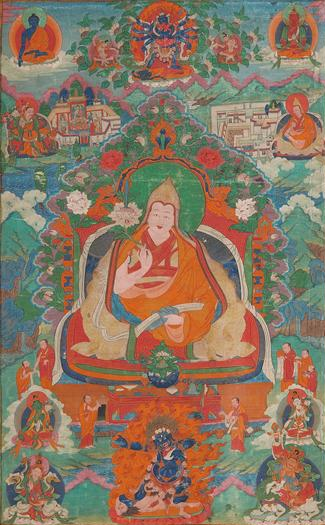 milieu du 18ème siècle. Kelzang Gyatso (1708-1757). Don Jacques Bacot, 1912